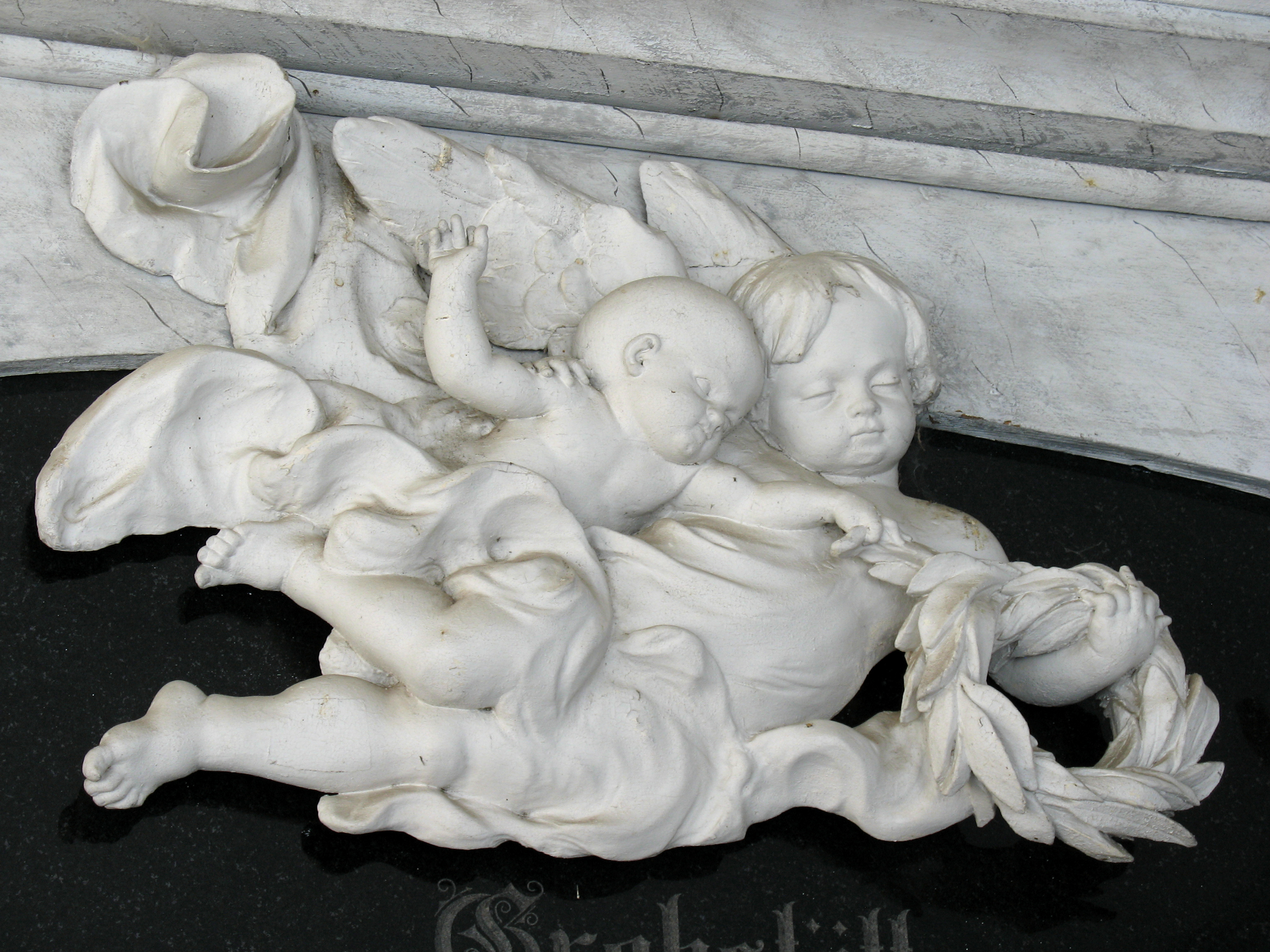 Sculpture in wood by Johann Baptist Moroder-Lusenberg (1870 – 1932) in St. Ulrich in Gröden - Ortisei Val Gardena